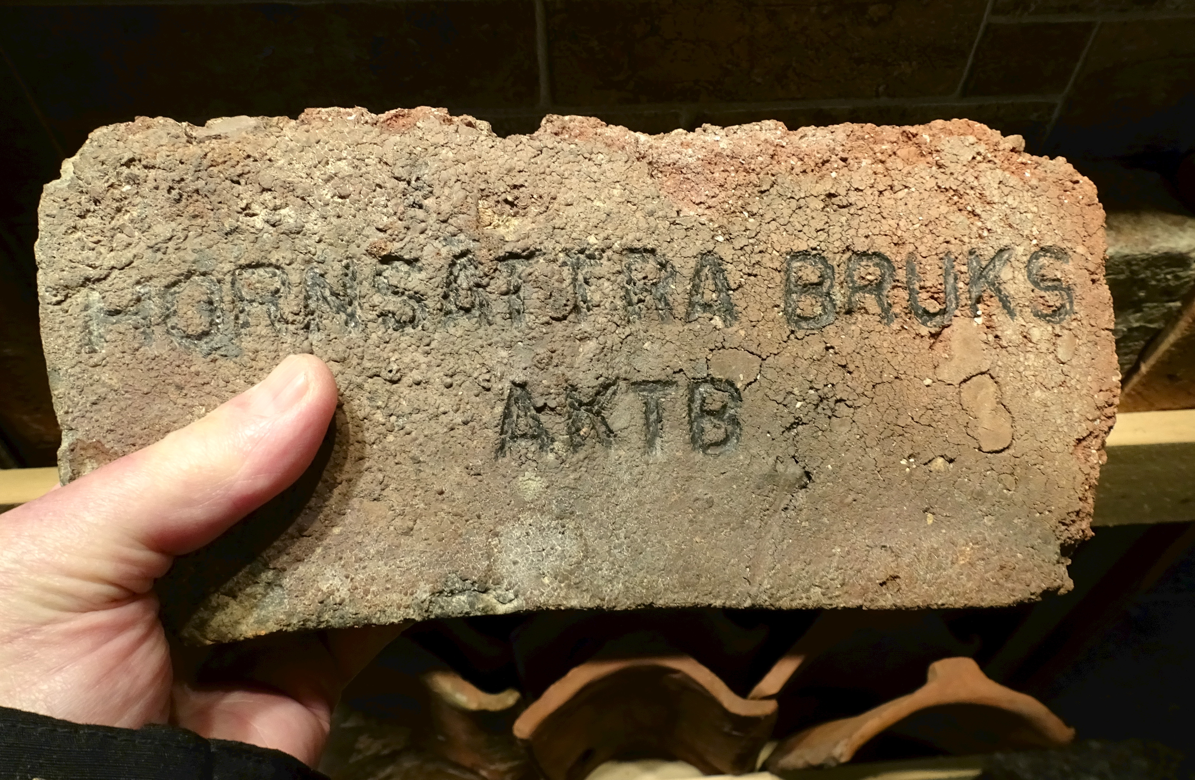 Hornsättra bruk, tegelsten med prägling "HORNSÄTTRA BRUKS AKTB"